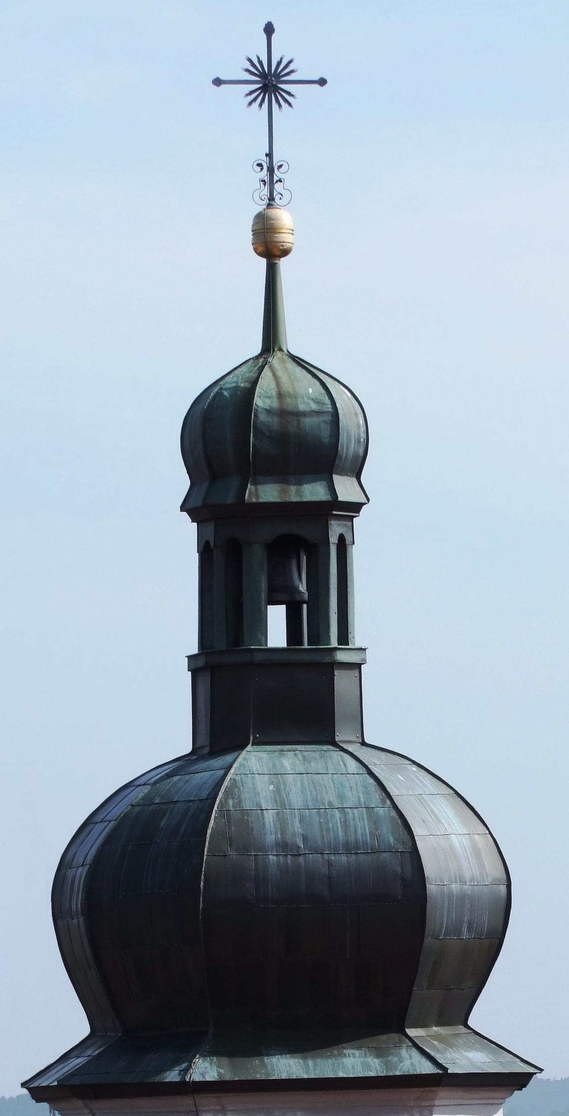 St. Maria im oberschwäbischen Buxheim bei Memmingen. Haube mit Glocke.